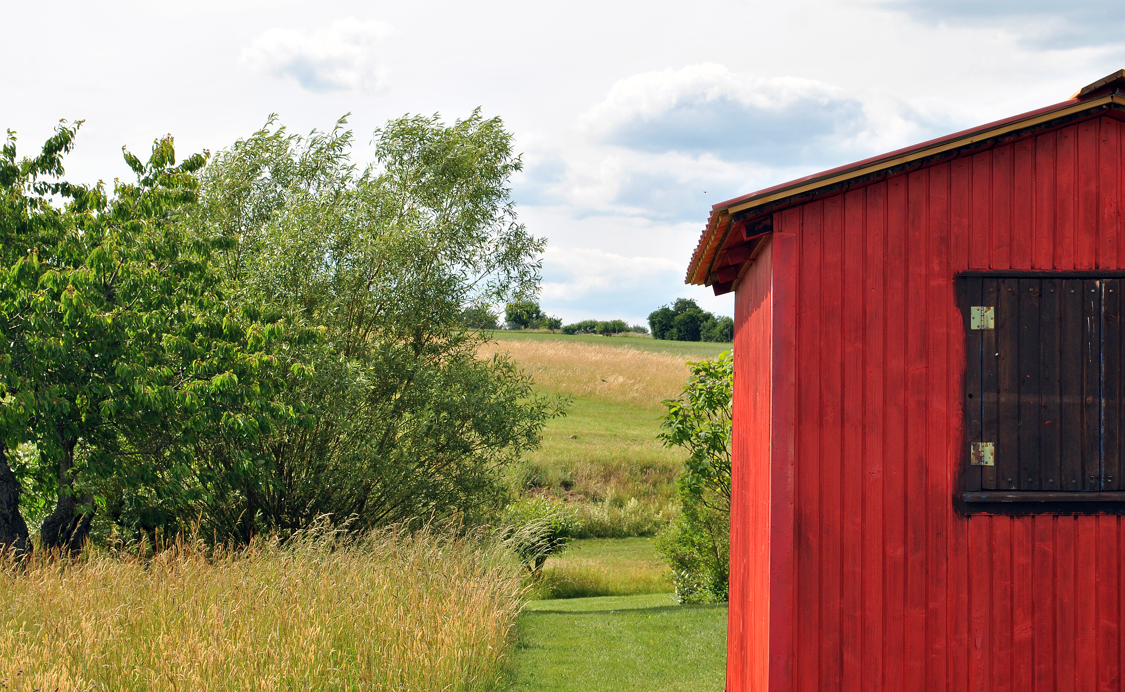 Impression vom nordwestlichen Rand des Odenwald-Dorfes Hesselbach